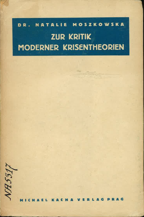 Page de titre de l'ouvrage de Natalie Moszkowska (1935)